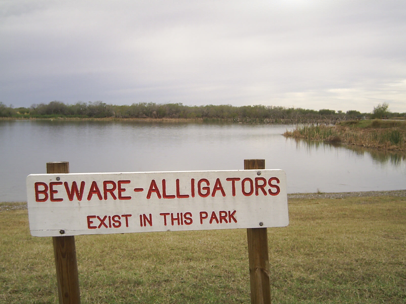 Ein Schild, das vor Alligatoren warnt